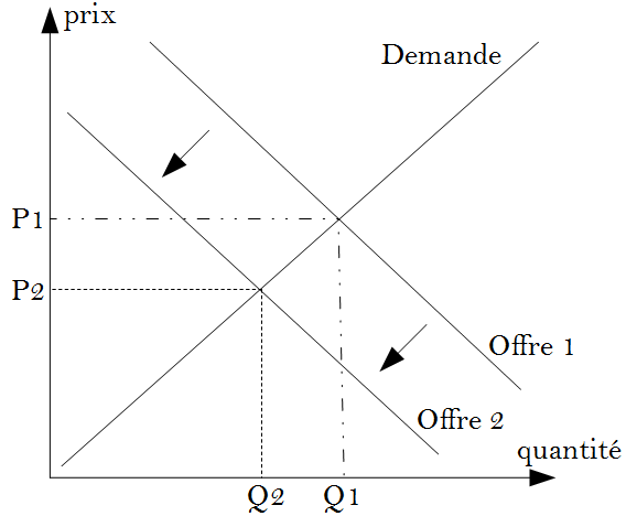 Baisses des prix et des quantités